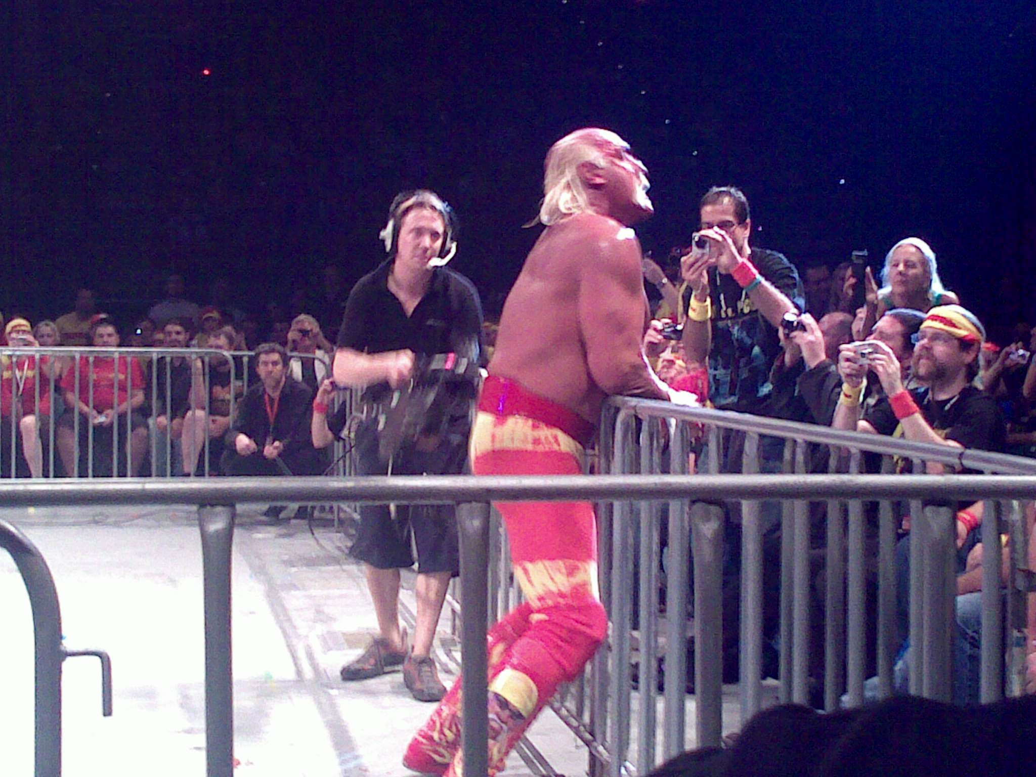 wrestling legend hulk hogan